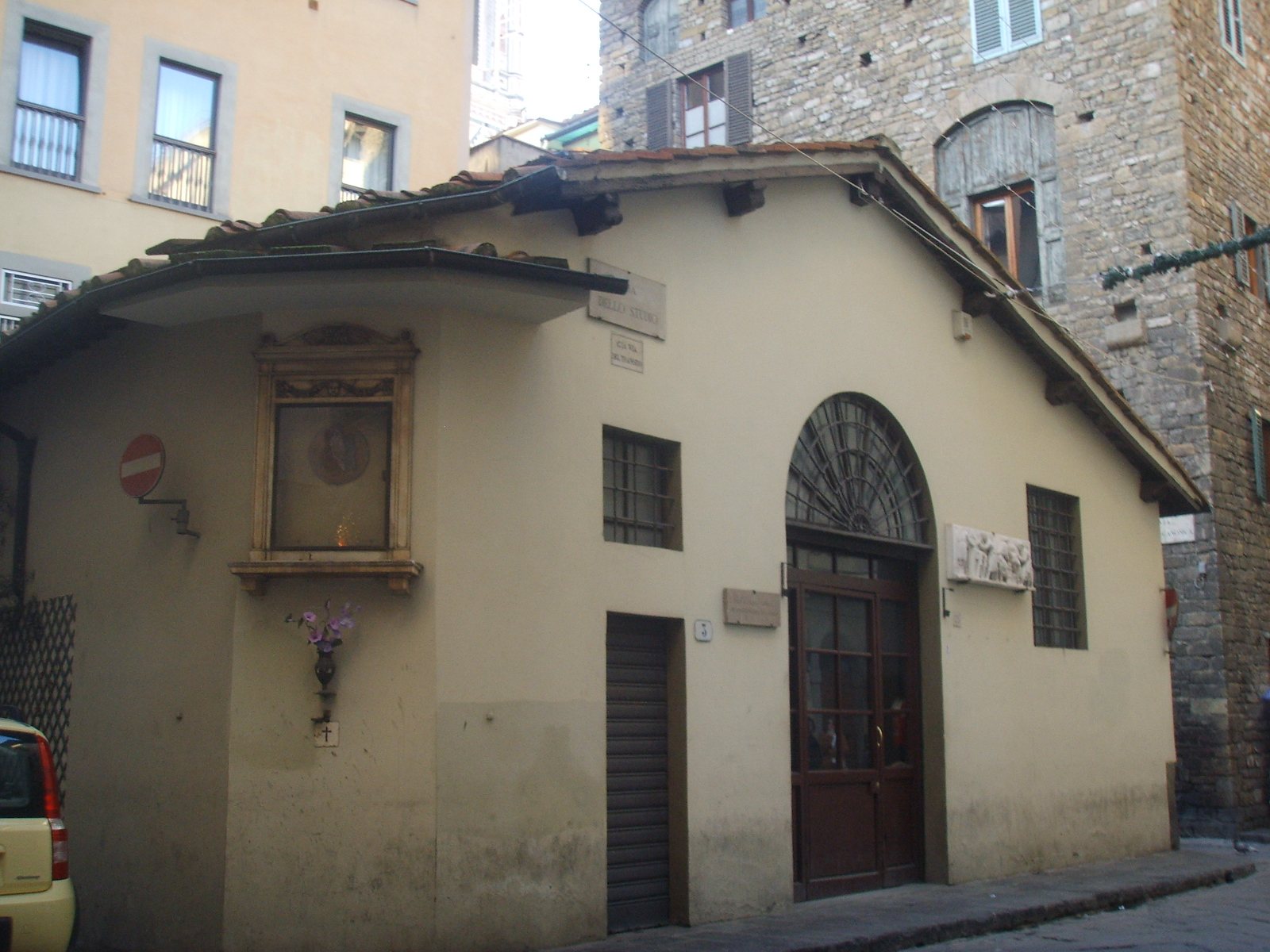 Bottega_dell'Opera_del_duomo in Florence, Italy